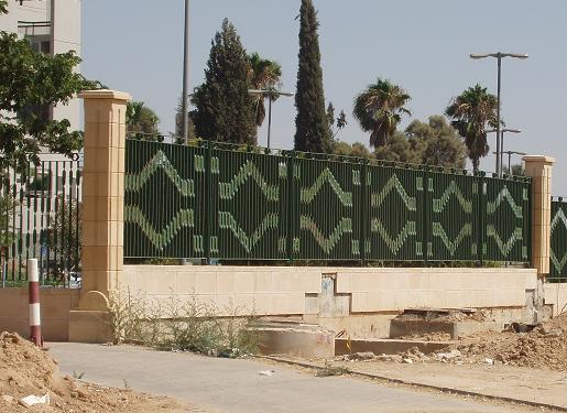 הגדר של ביה"ח סורוקה צילם דוד שי